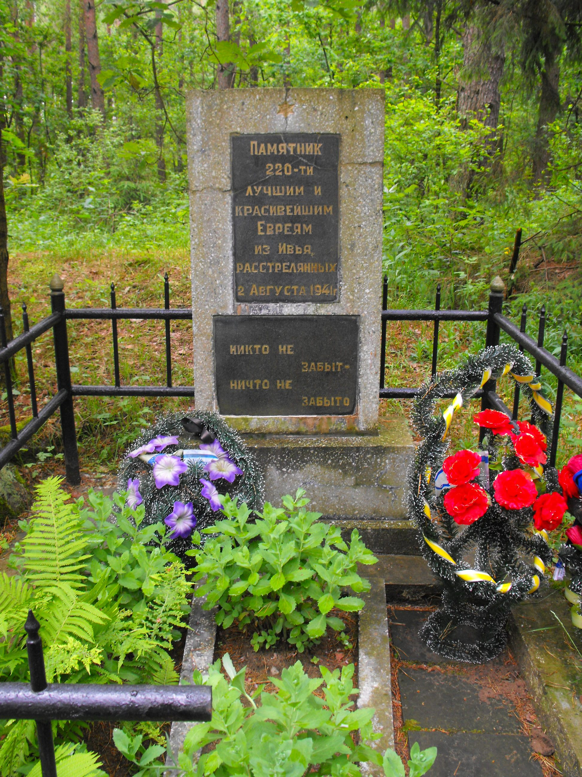 Памятник мемориального комплекса на месте убийства 220 евреев Ивье нацистами и полицаями 2 августа 1941 года. Находится рядом с Ивье, у деревни Стоневичи (урочище Стоневичи), у дороги H-6147.